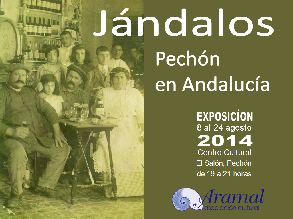 Exposición fotográfica de los Jándalos que partieron de Pechón, en el centro cultural "El Salón" de Pechón (Cantabria) del 8 al 24 de Agosto de 2014.